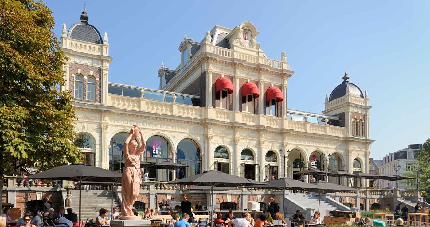 VondelCS op een zonnige dag. Vanaf verdieping 1 VondelCS; in het souterrain zit een aparte horecagelegenheid